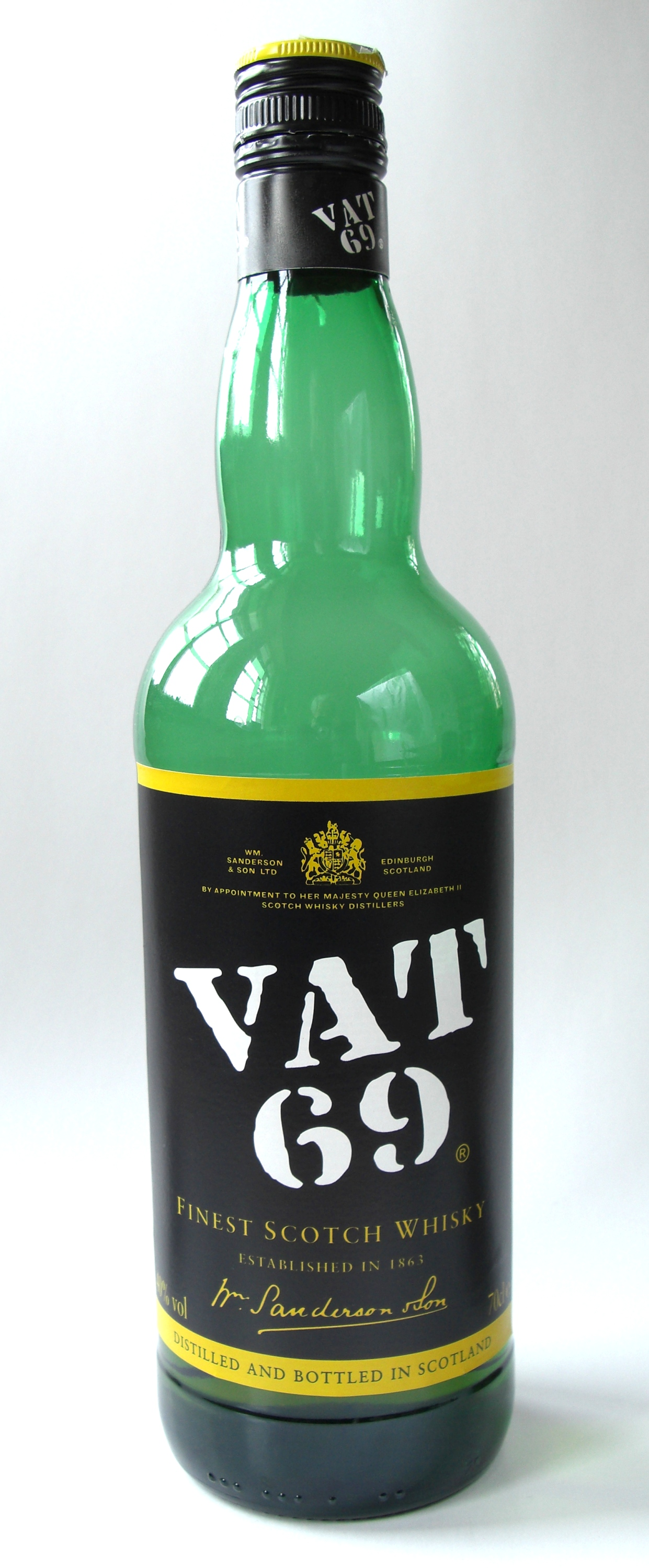 See title